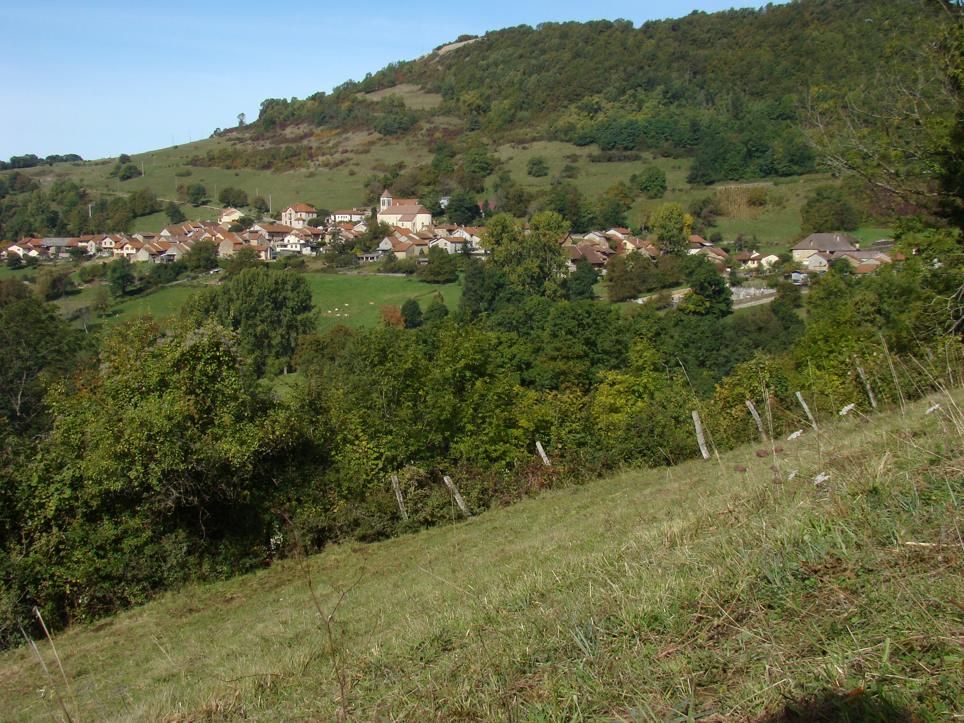 Vue sur le village de Souclin